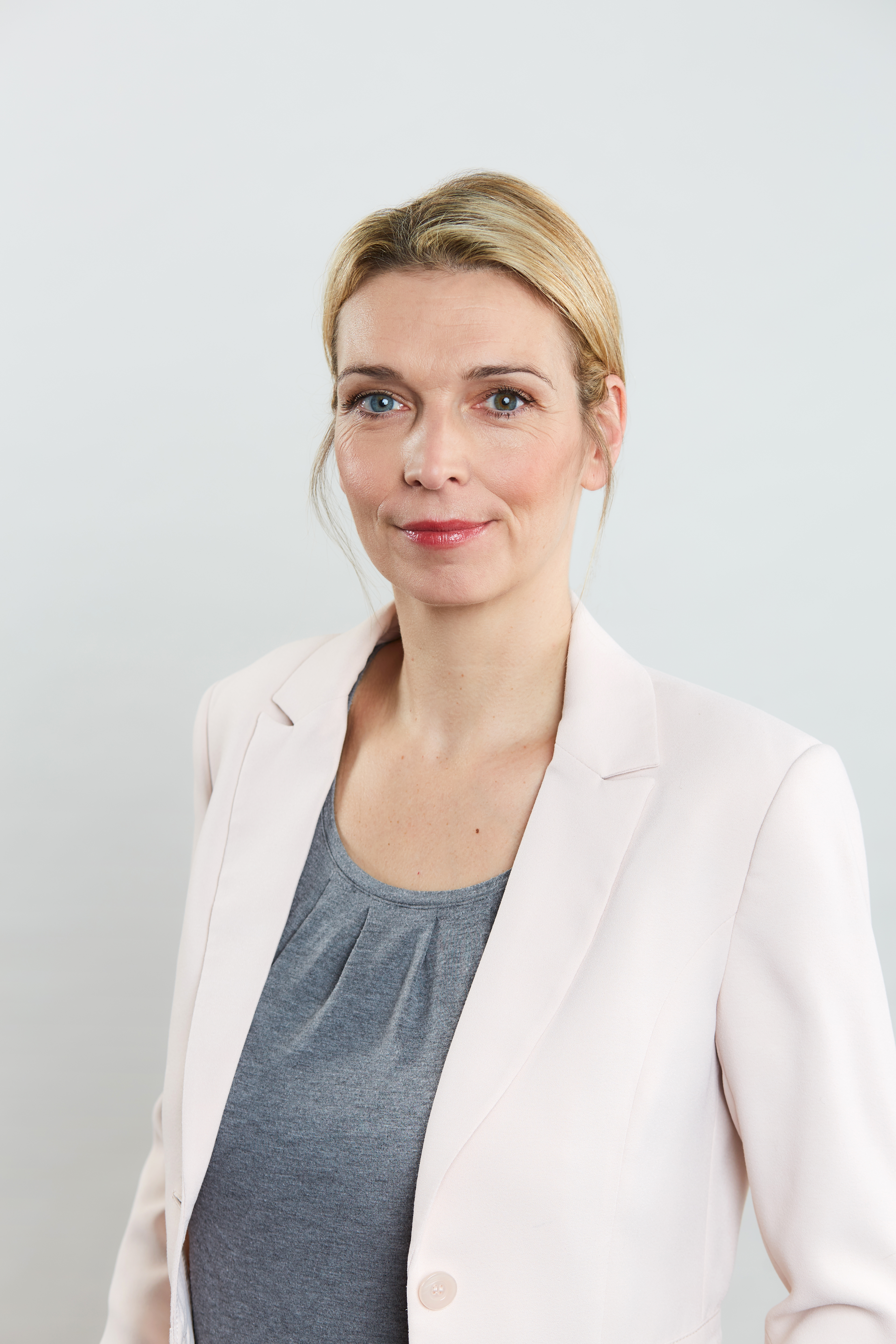 Svenja Stadler Studioportrait im Januar 2019